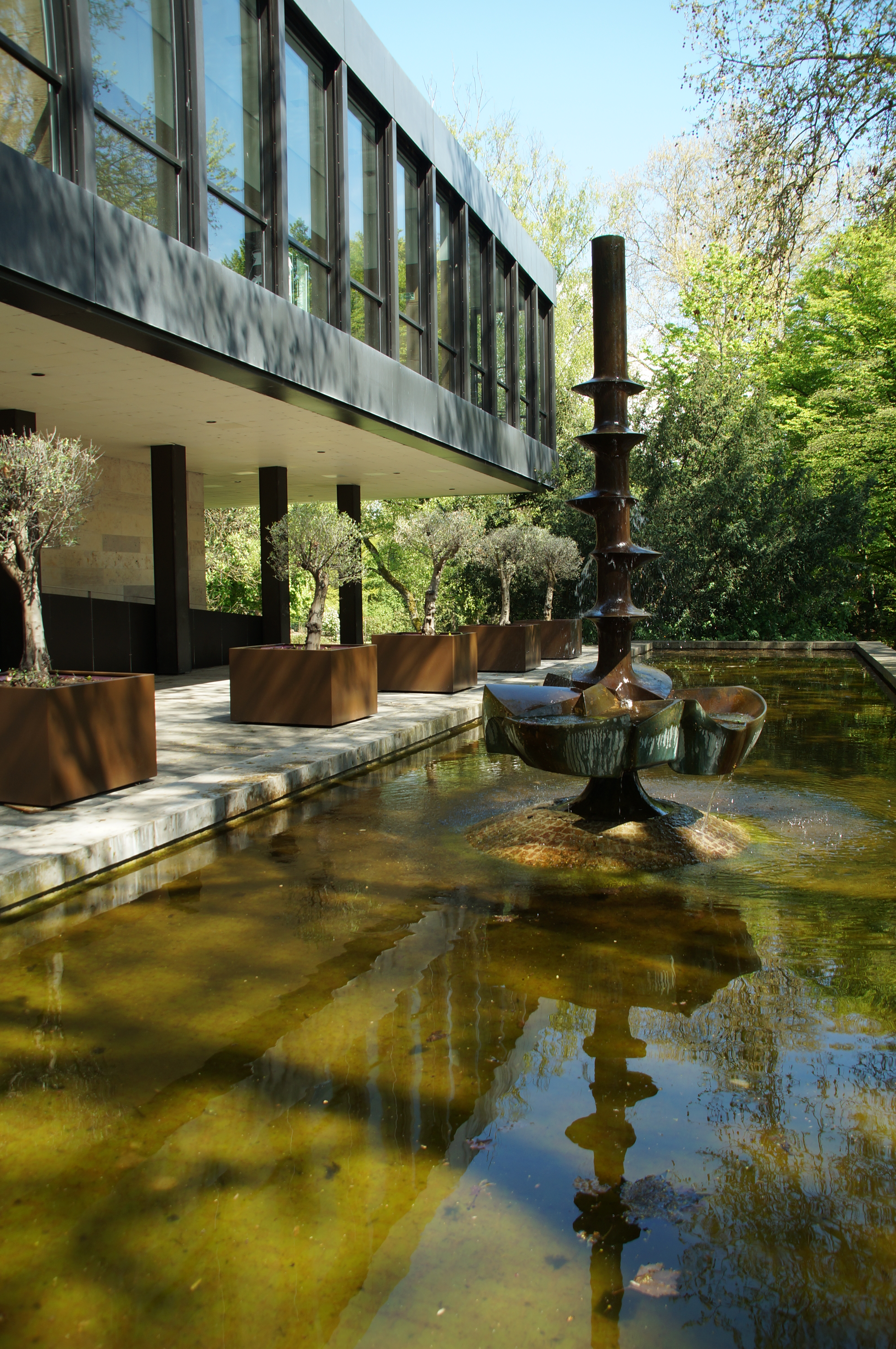 Ehemaliges Kasino der OBAG, transparenter Saalbau mit Flachdach, auf ummantelten Stahlstützen und einem eingerückten, natursteinverkleideten Betonsockel, verglaster Verbindungsgang zum Haupthaus, 1968-71, von Walter Mayer; Südlich vorgelagert rechteckige Brunnenanlage mit Plastik von Karl Reidel, 1970 This is a photograph of an architectural monument.